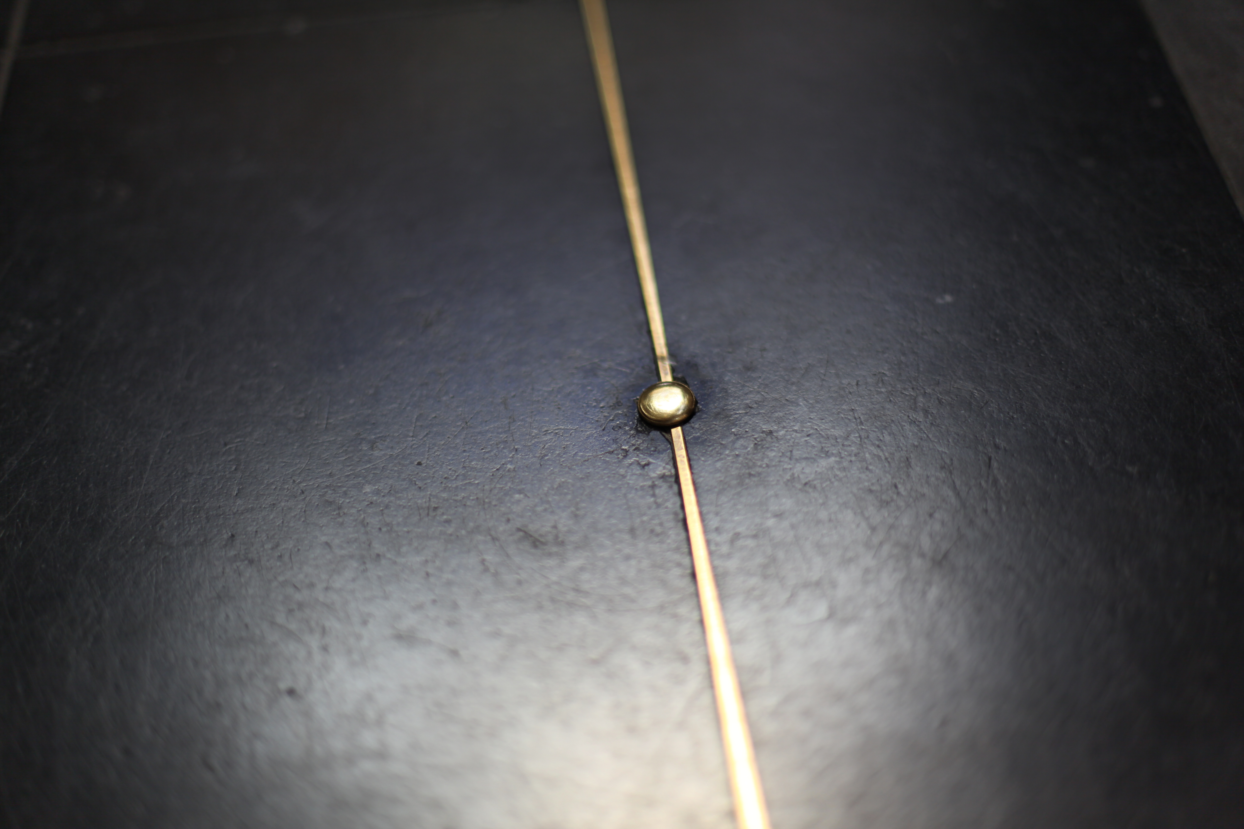 Un des rivets indiquant les intervalles horaires le long de la ligne du méridien.